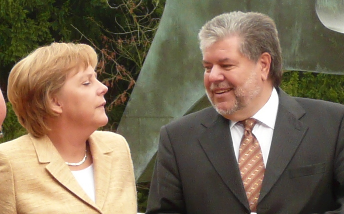 Angela Merkel, Kurt Beck